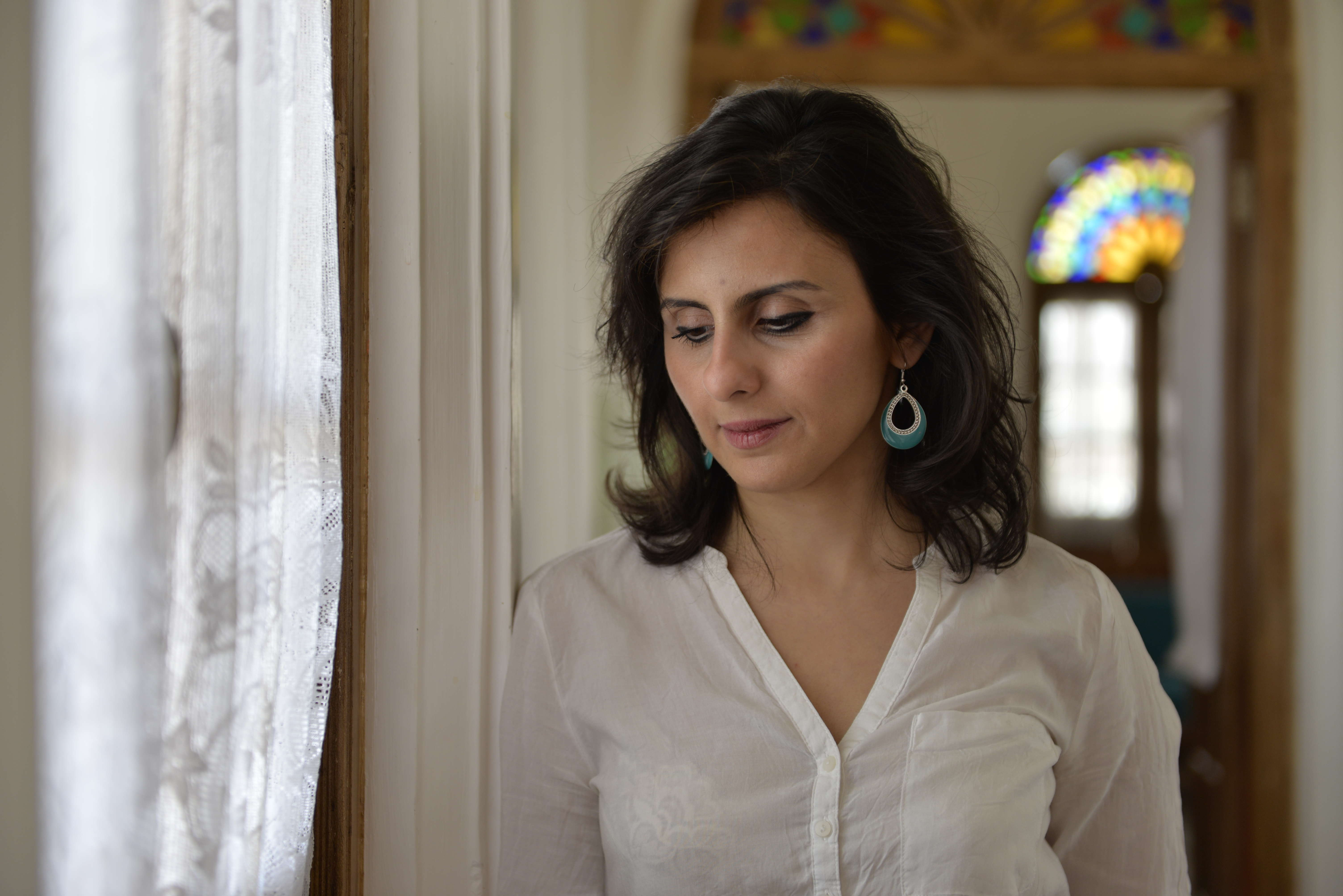 Layla Ramezan est une pianiste iranienne